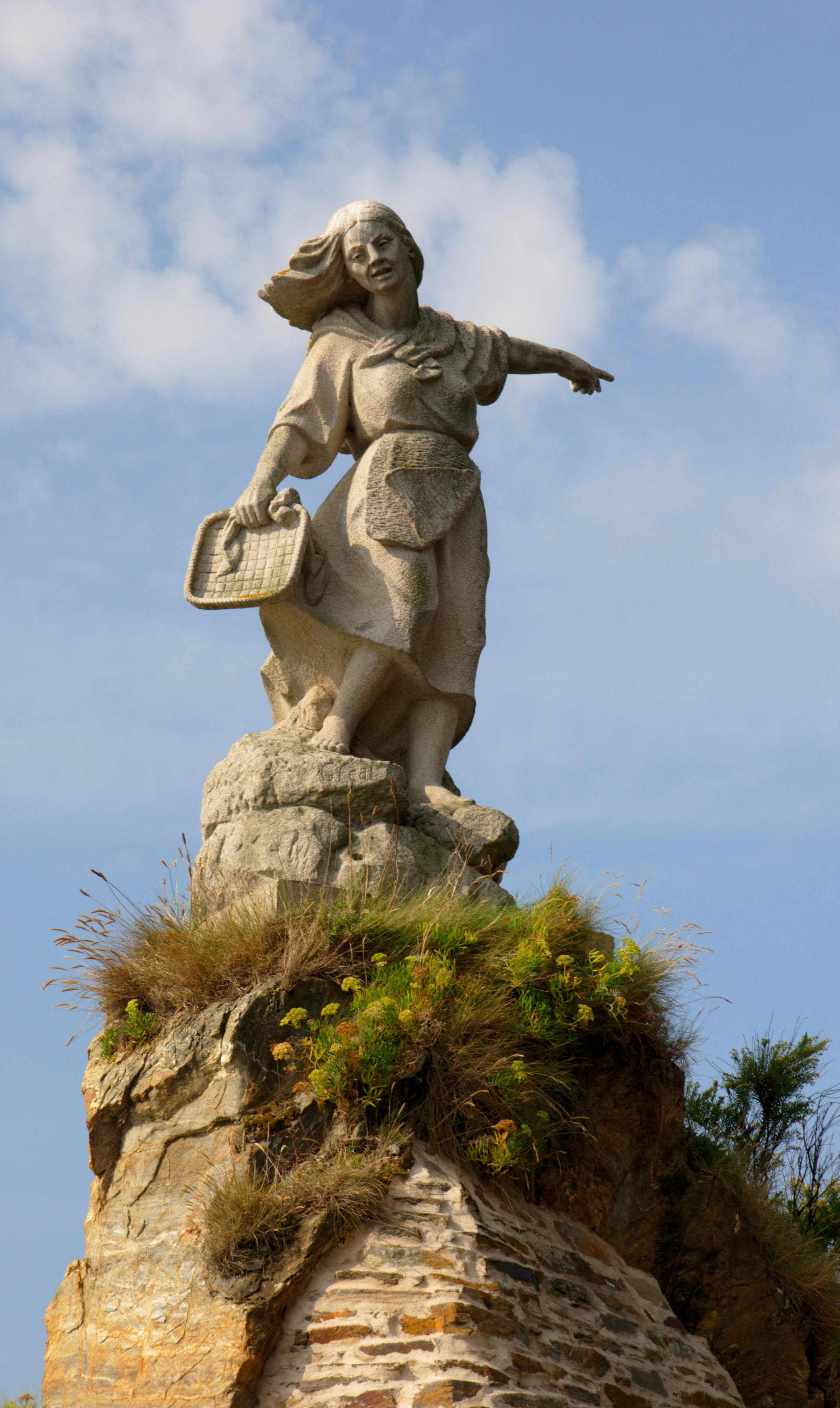 Cedeira, Galicien; Skulptur am Hafen zu Ehren der Fischersfrauen